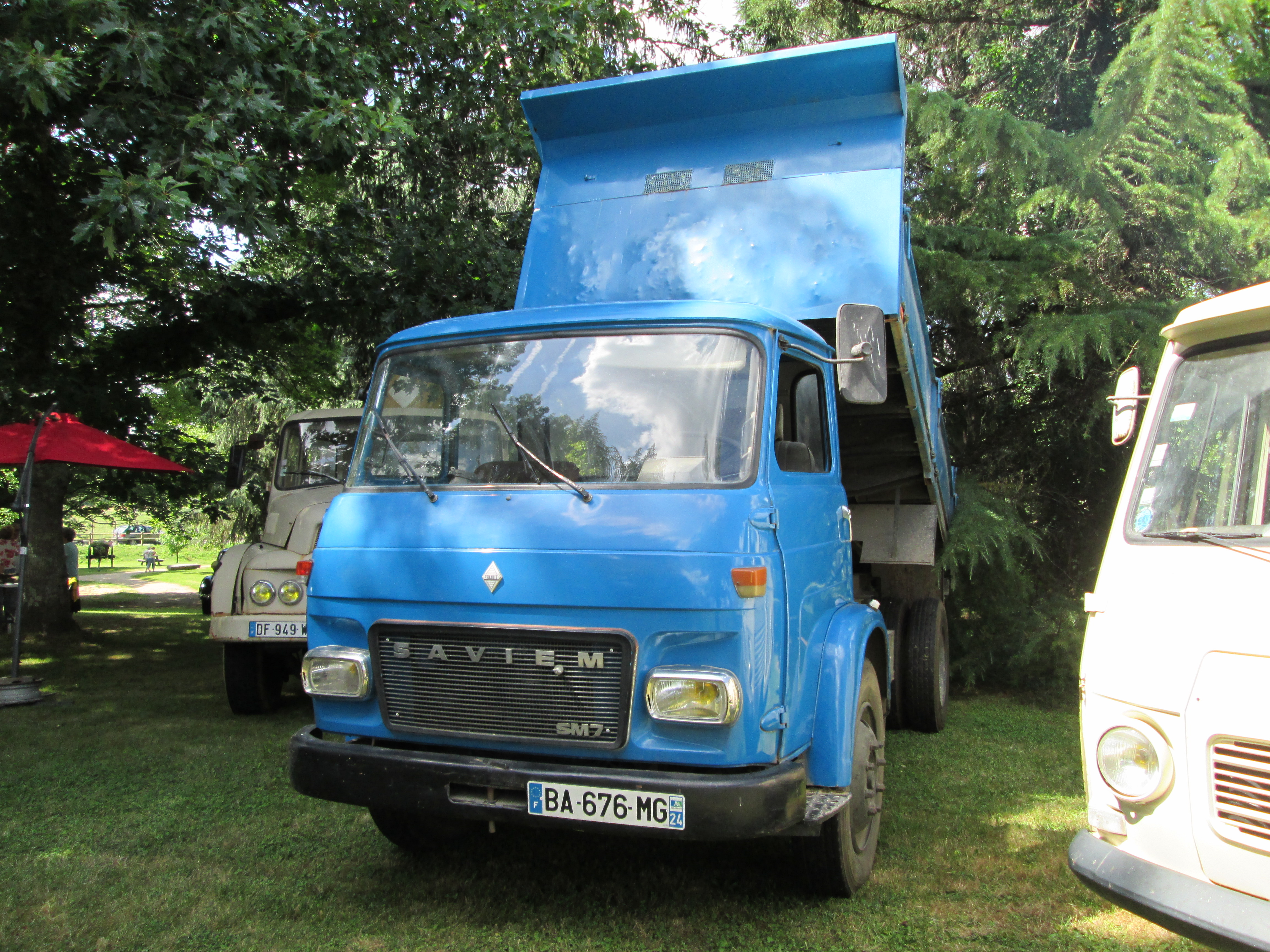 Saviem SM7 (10,95 tonnes de PTC) avec benne relevée.